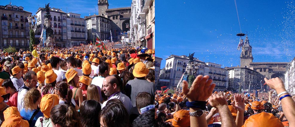 Inauguratie feesten Vitoria te 4 augustus 2005. Foto gemaakt door J. van Vliet